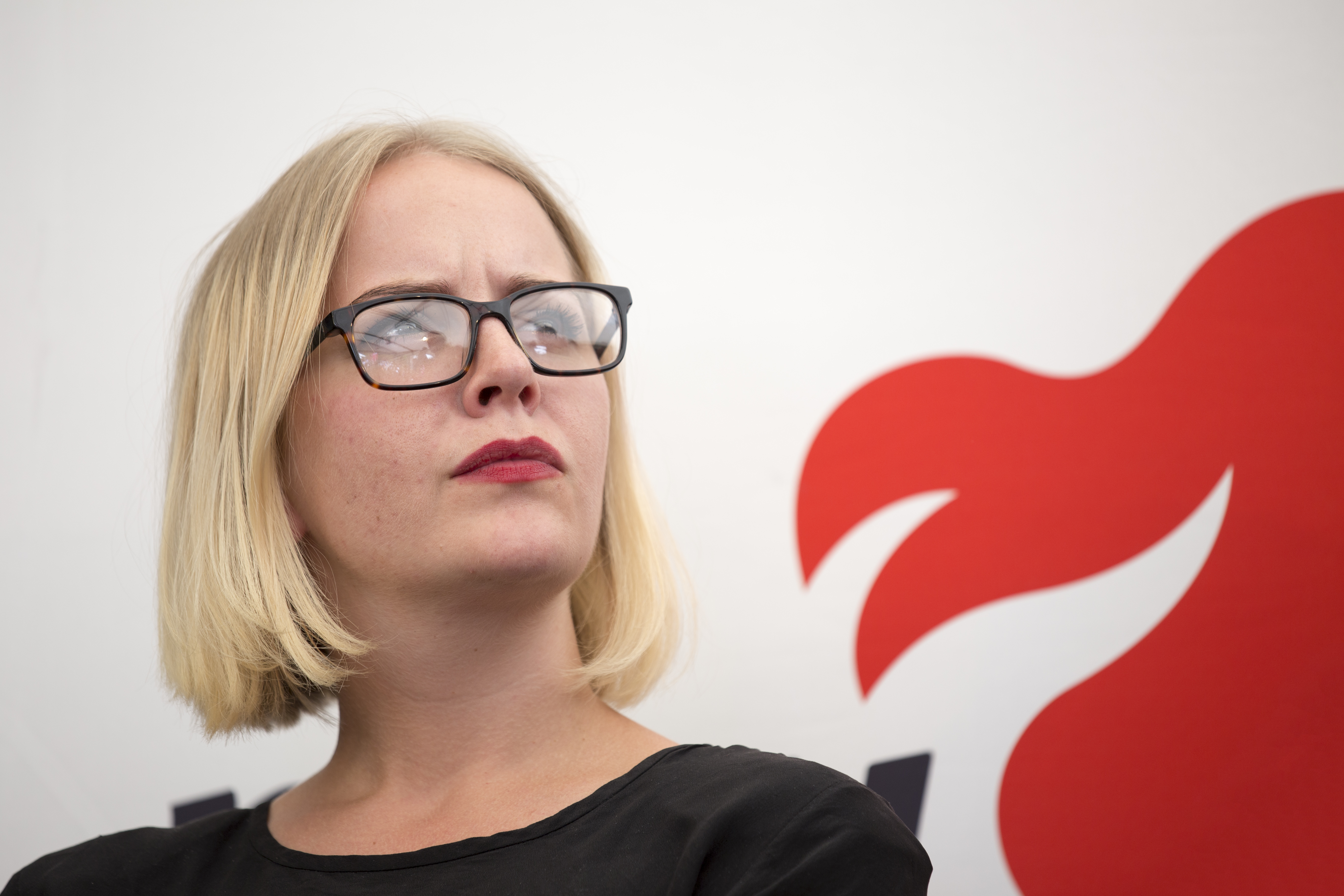 Hanna Cederin